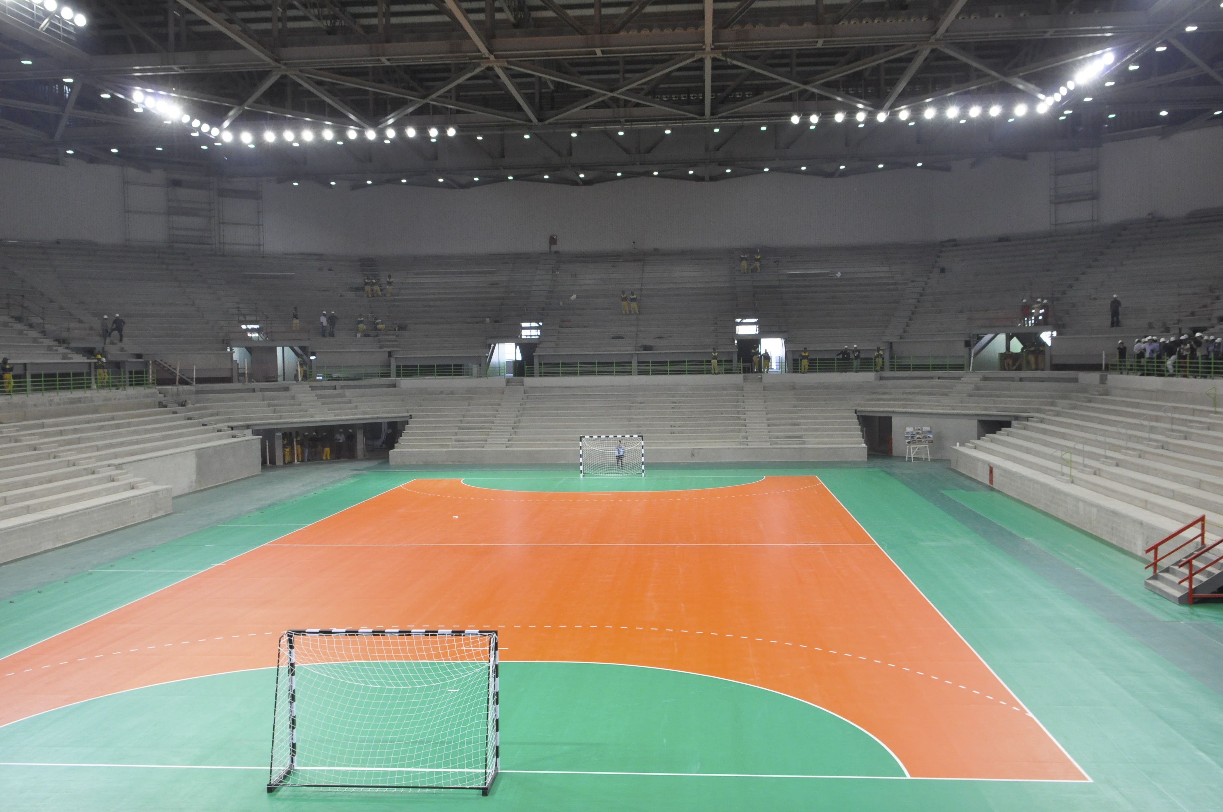 Obras do Parque Olímpico da Barra da Tijuca, a um ano das Olimpíadas.